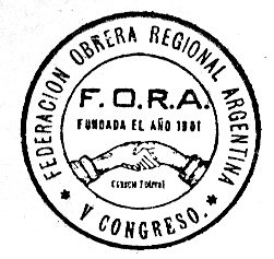 sello de archivo